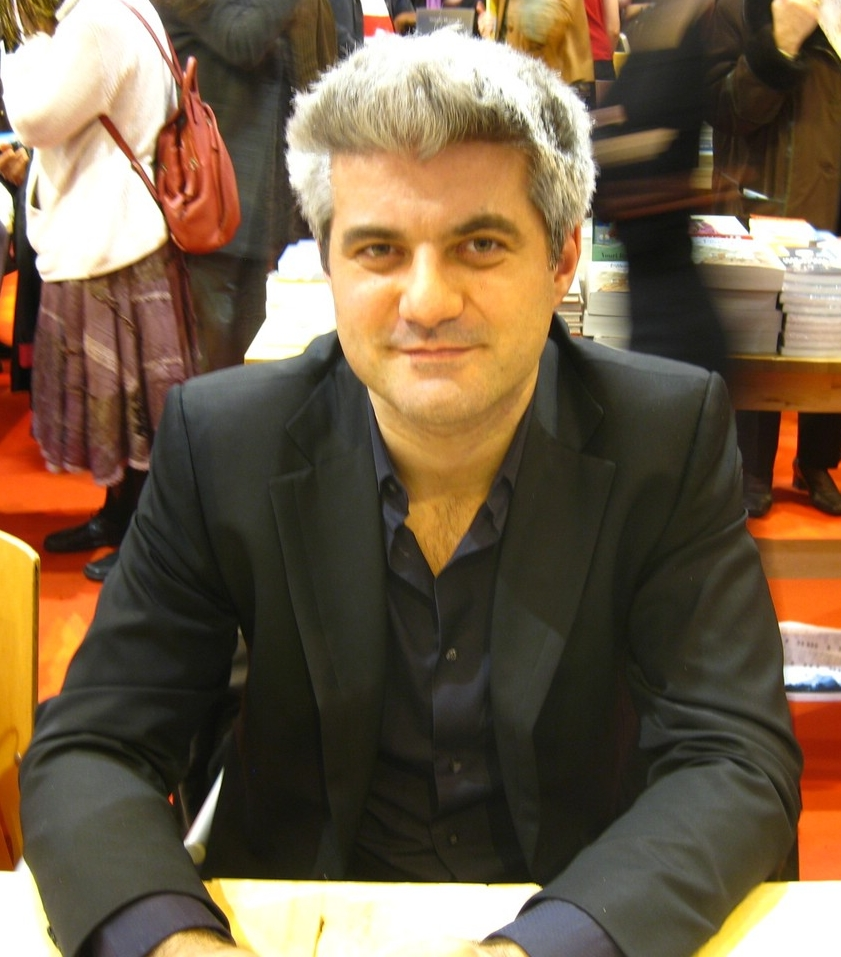 Laurent Gaudé au Salon du Livre de Paris le 14 mars 2009.